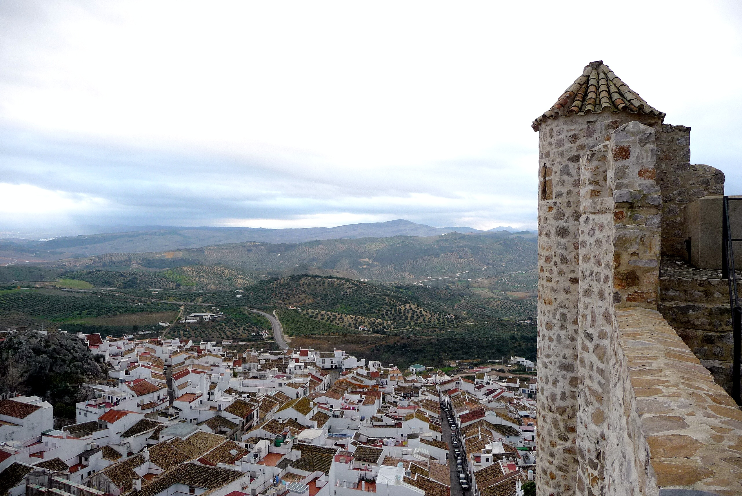 Olvera (Andalusia, Spain).